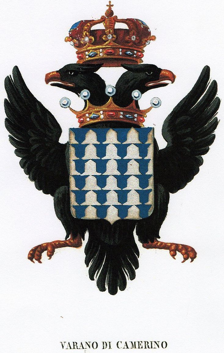 écusson des Varano de Camerino, image obtenue, par scanner, à partir de la lithographie de la fin du XIXe siècle